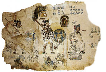 Fragment uit een Azteeks wetboek.